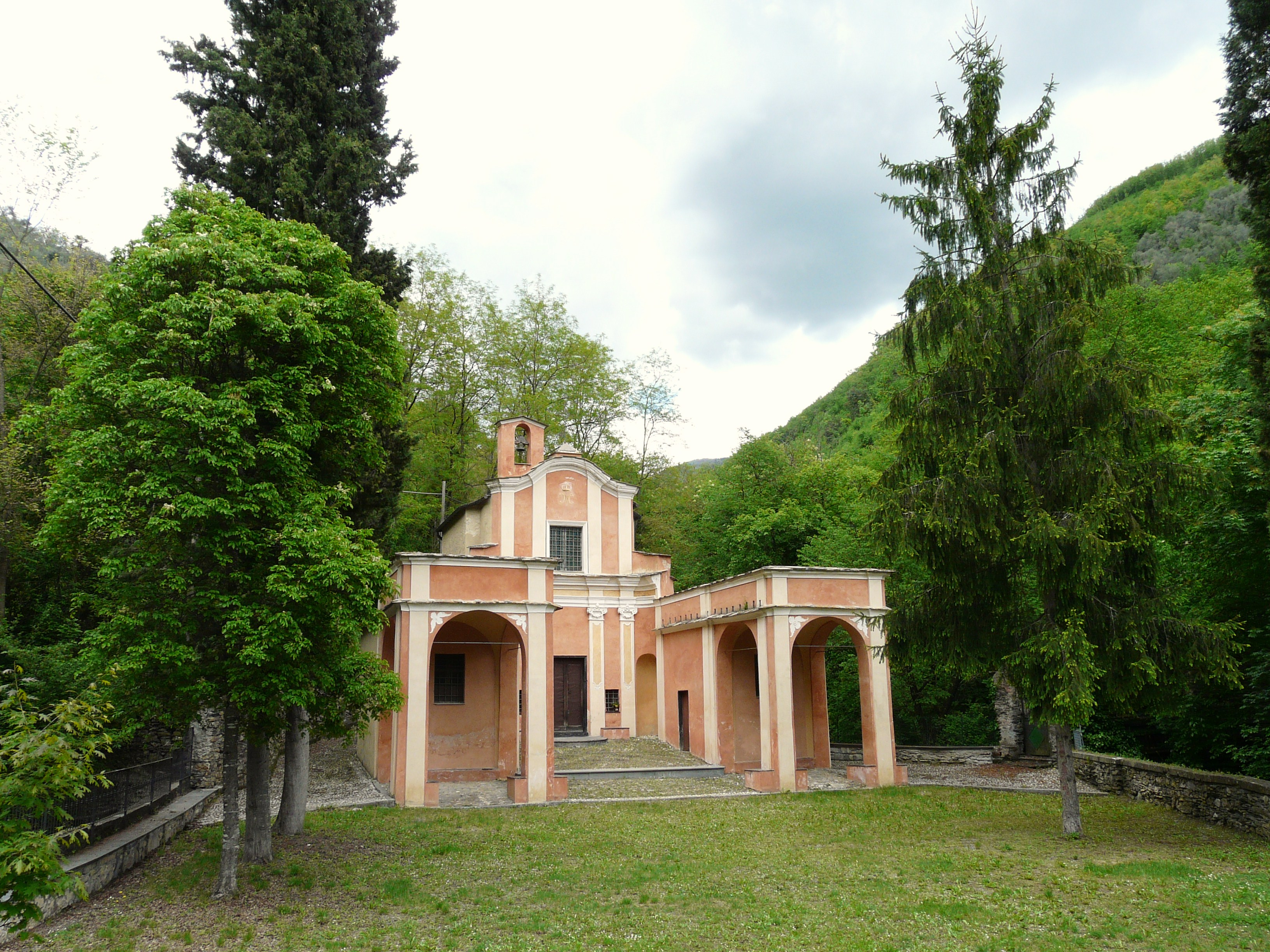 Santuario della Madonna dei Fanghi, Comune di Pieve di Teco, Liguria, Italia